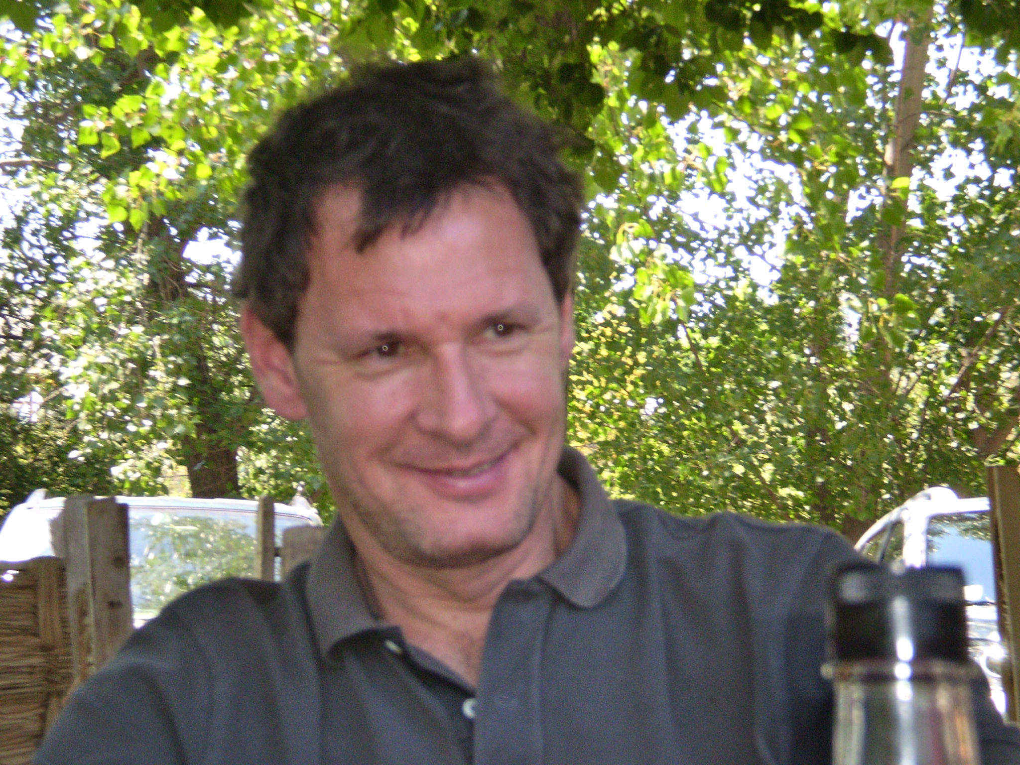 foto bergoeing en el campo